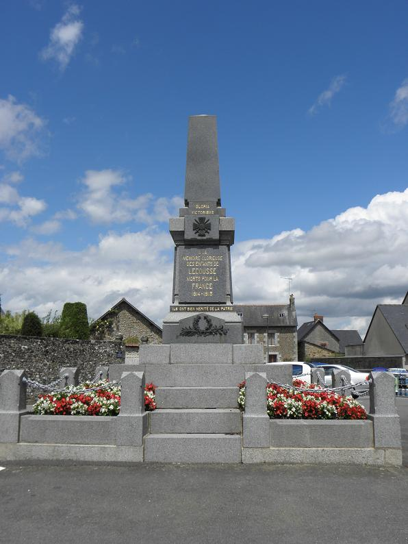 Monument aux morts de Lécousse (35).